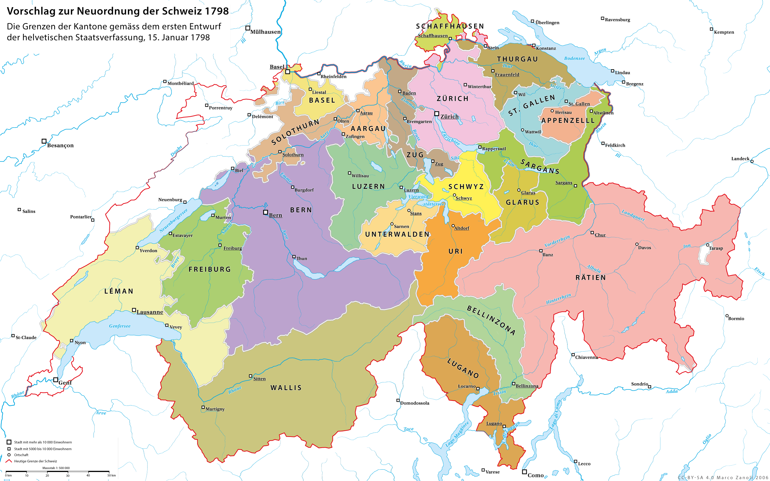 Die Helvetische Republik gemäss dem ersten Entwurf der helvetischen Staatsverfassung vom 15. Januar 1798